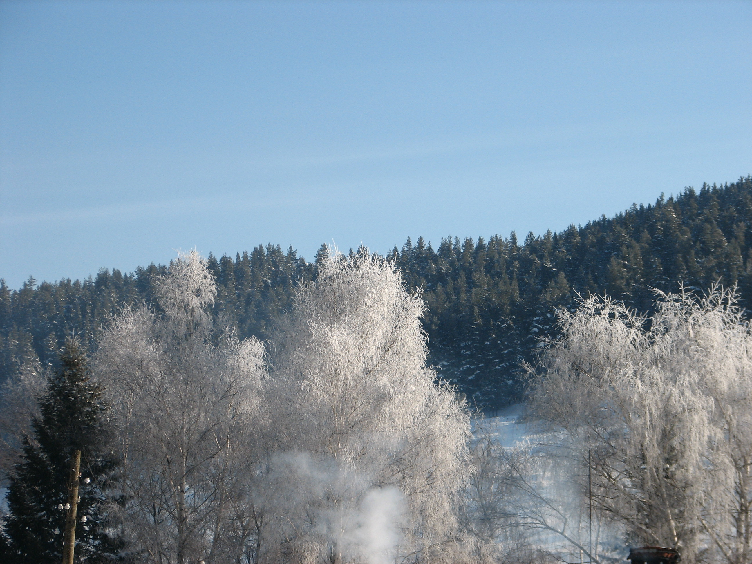 И под студа и под снега живот се захваща